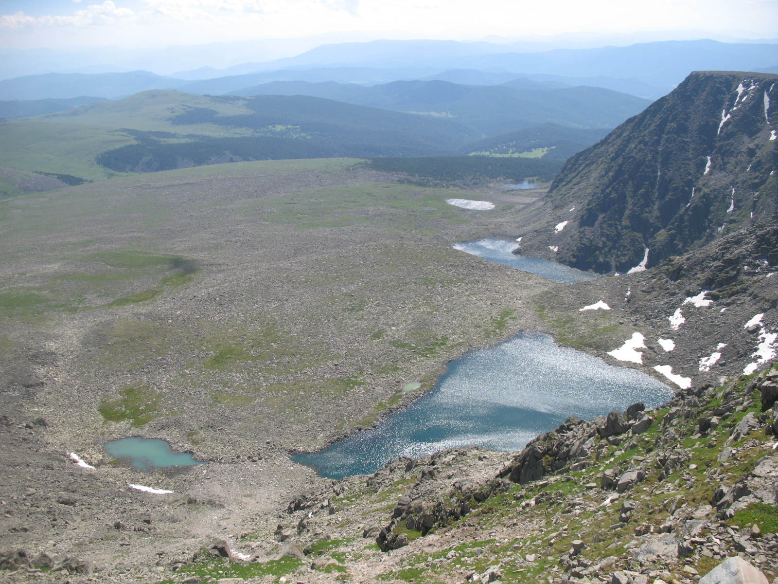 Куратинские озёра, вид с вершины горы Сарлык